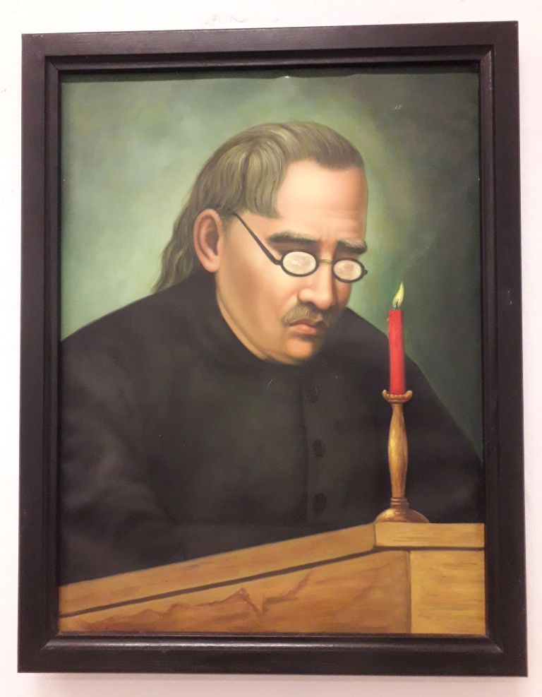 Johann Heindrich Schmülling (!774-1851) katholischer Geistlicher, Professor der Philosophie am Lyceum zu Braunsberg, dyrektor Liceum Hosianum w Braniewie, Braunsberger Landesmuseum, Muzeum Ziemi Braniewskiej